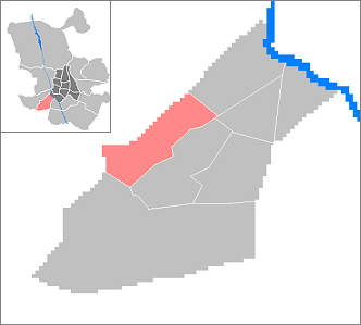 Barrio de Vista Alegre, Madrid